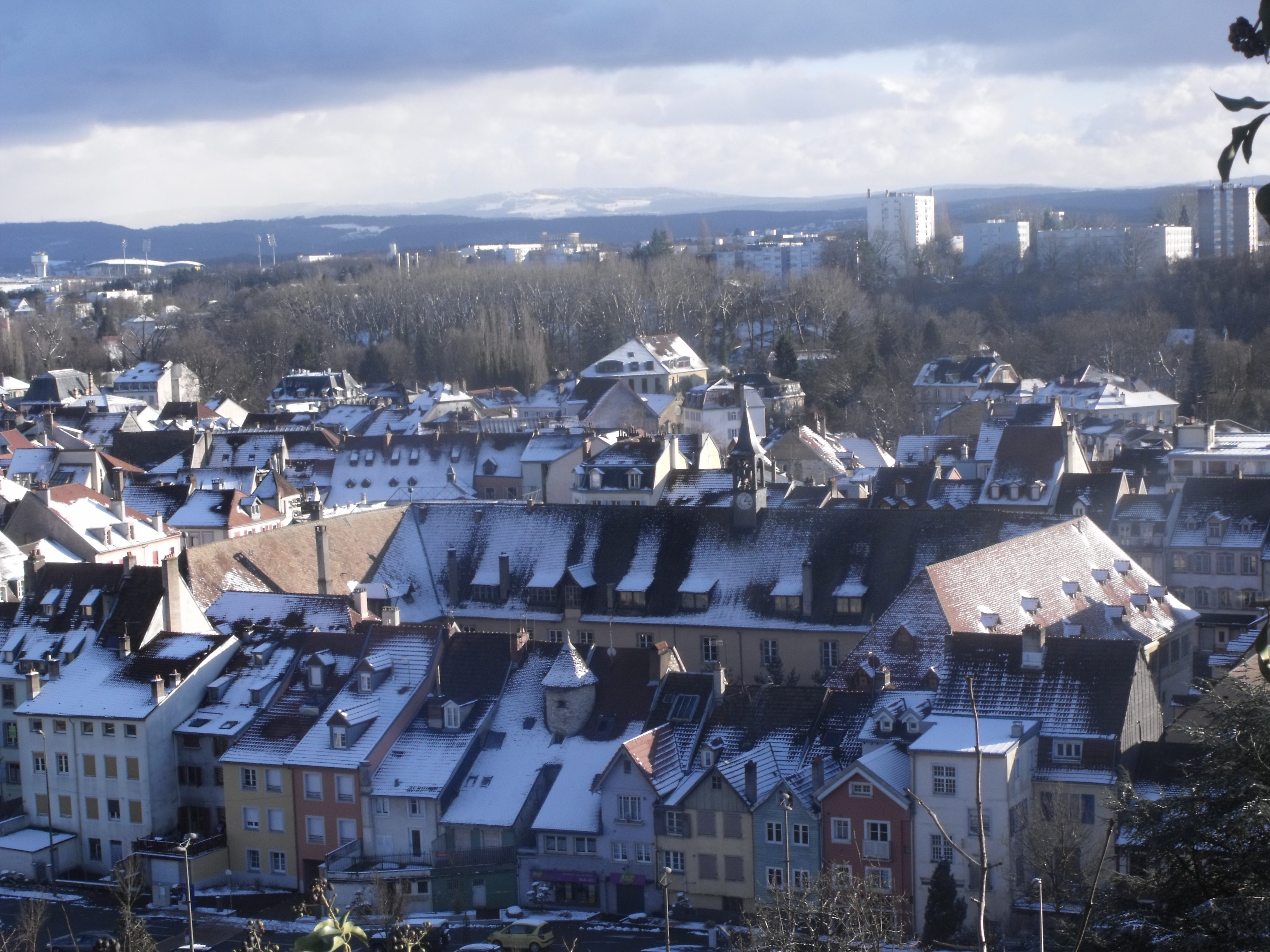 Vue arrière de la Halle de Montbéliard